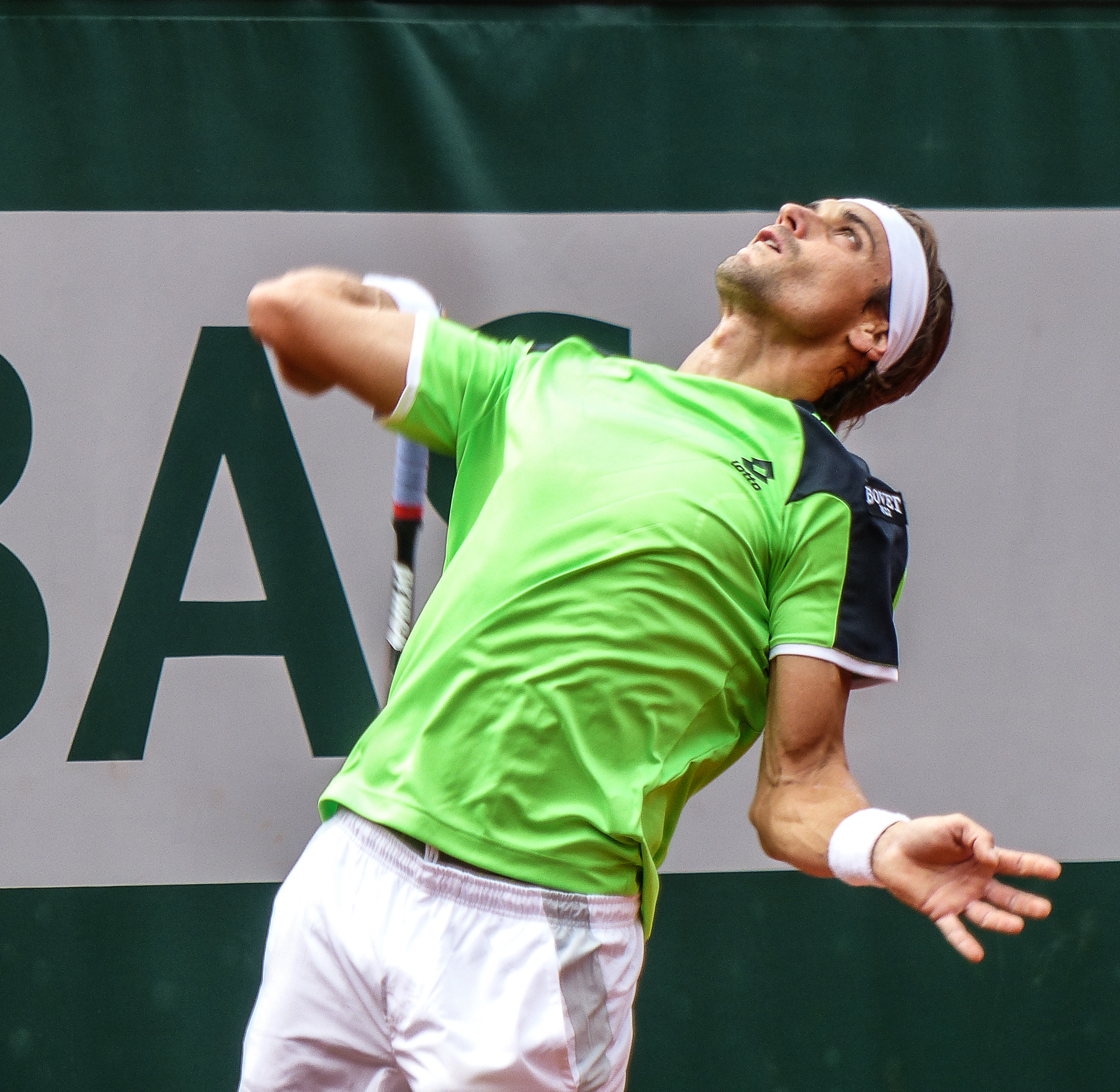 2ème tour Roland Garros 2013 : David Ferrer (ESP) def. Albert Montanes (ESP)